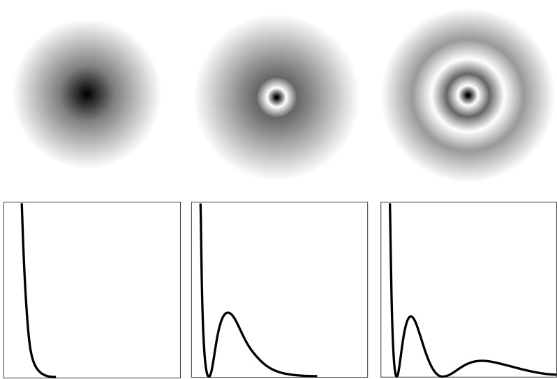 s orbitals